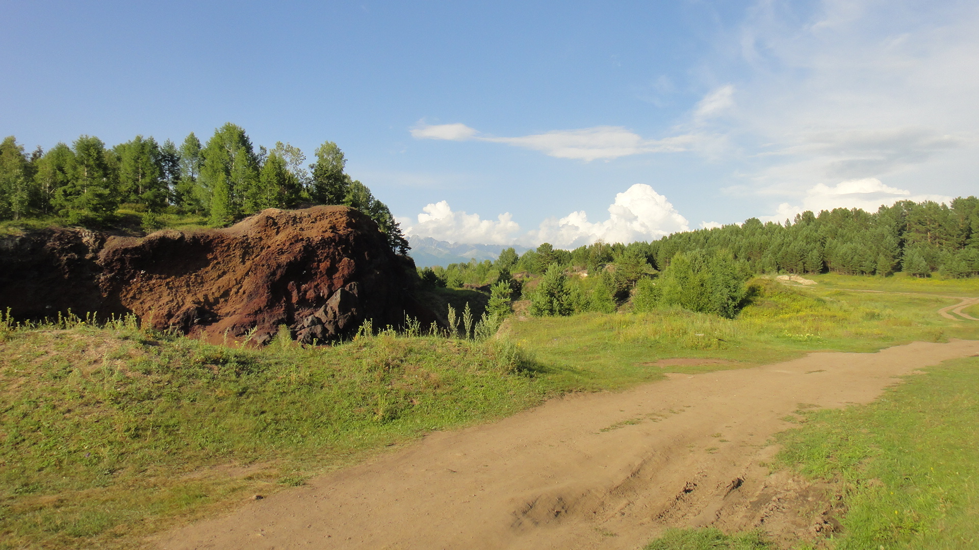 потухшие вулканы в окрестностях Аршана